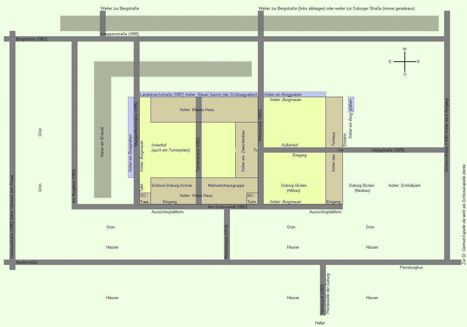 Grobe Veranschaulichungsskizze des Duburgareals (mit dem Wall an der Burgstraße)